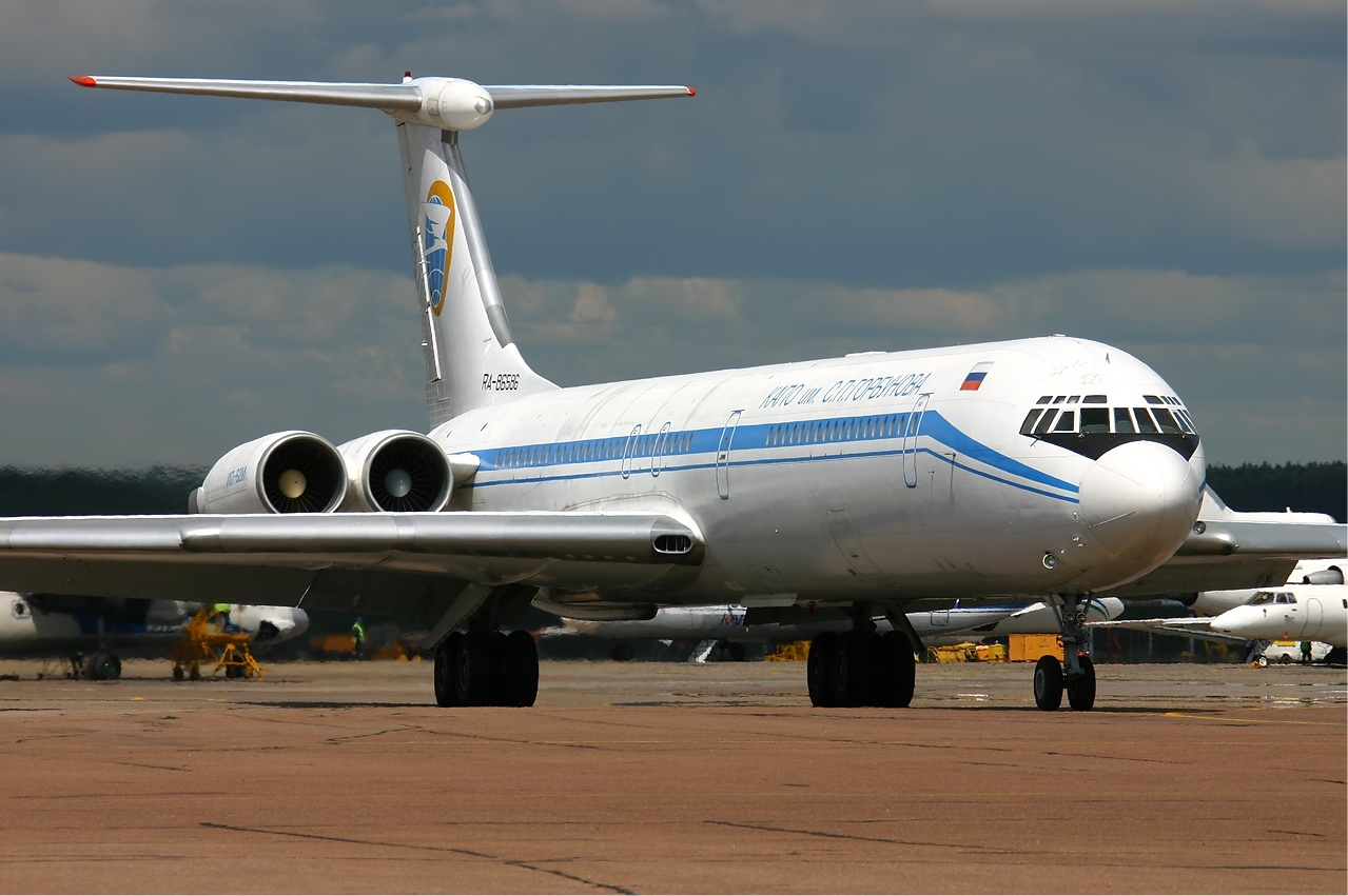 KAPO Ilyushin Il-62